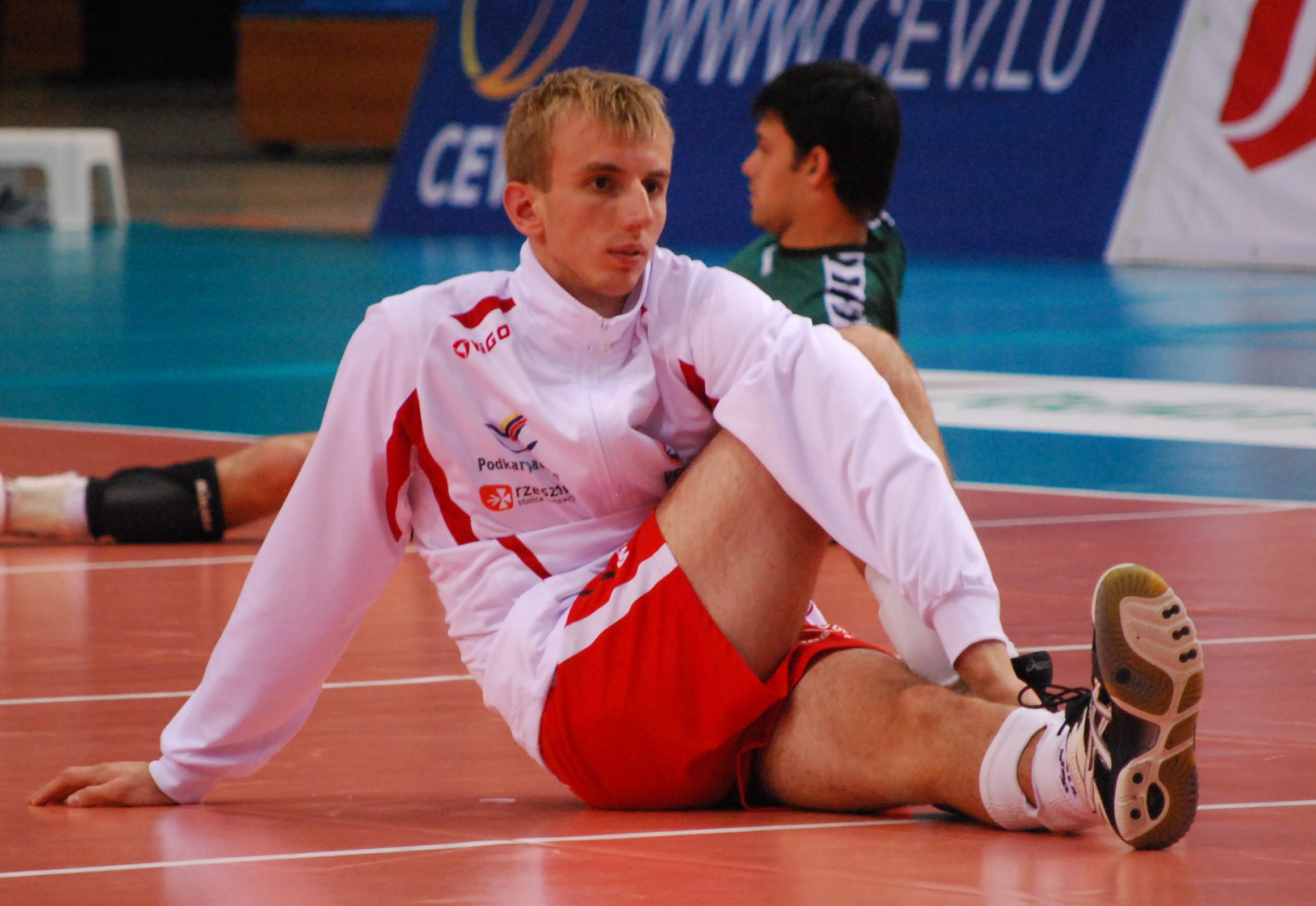 Jakub Peszko